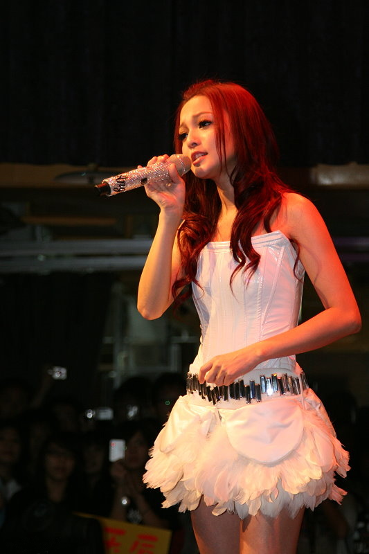 張韶涵第五季專輯簽唱會＠河岸留言Bân-lâm-gú: Tiunn Siâu-hâm tē-gōo-kuì tsuan-tsi̍p tshiam-tshiùnn-huē @ Hô-huānn Liû-giân.